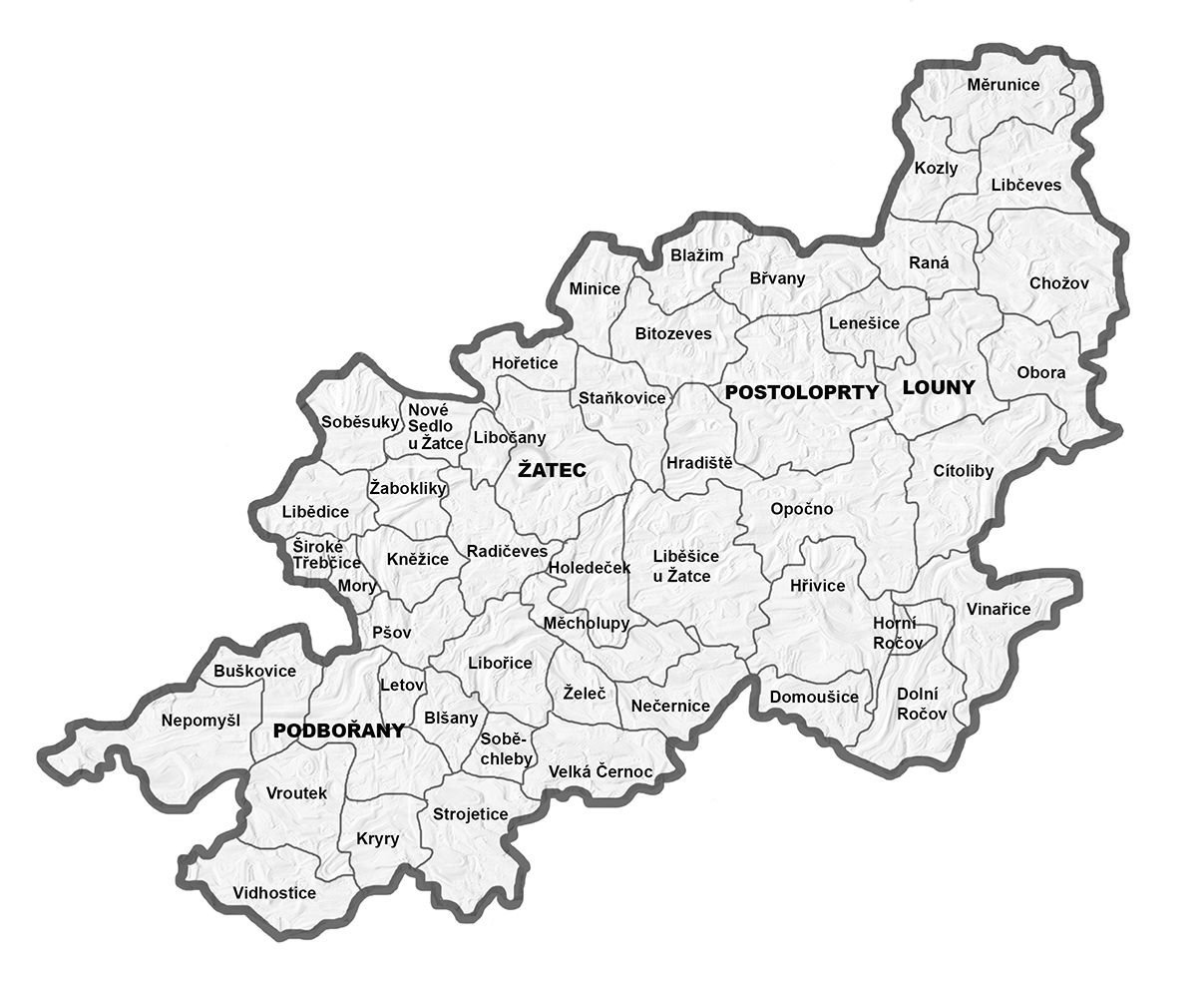 Diecéze litoměřická, lounský vikariát - farnosti